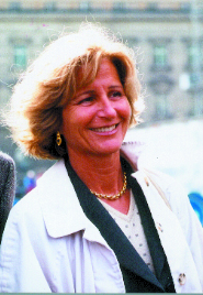 Petra Lejeune in Berlin